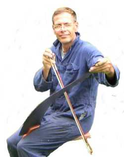 Autorretrato de Gebruiker:Pijnack con sierra musical, subido por él a Wikipedia en neerlandés.